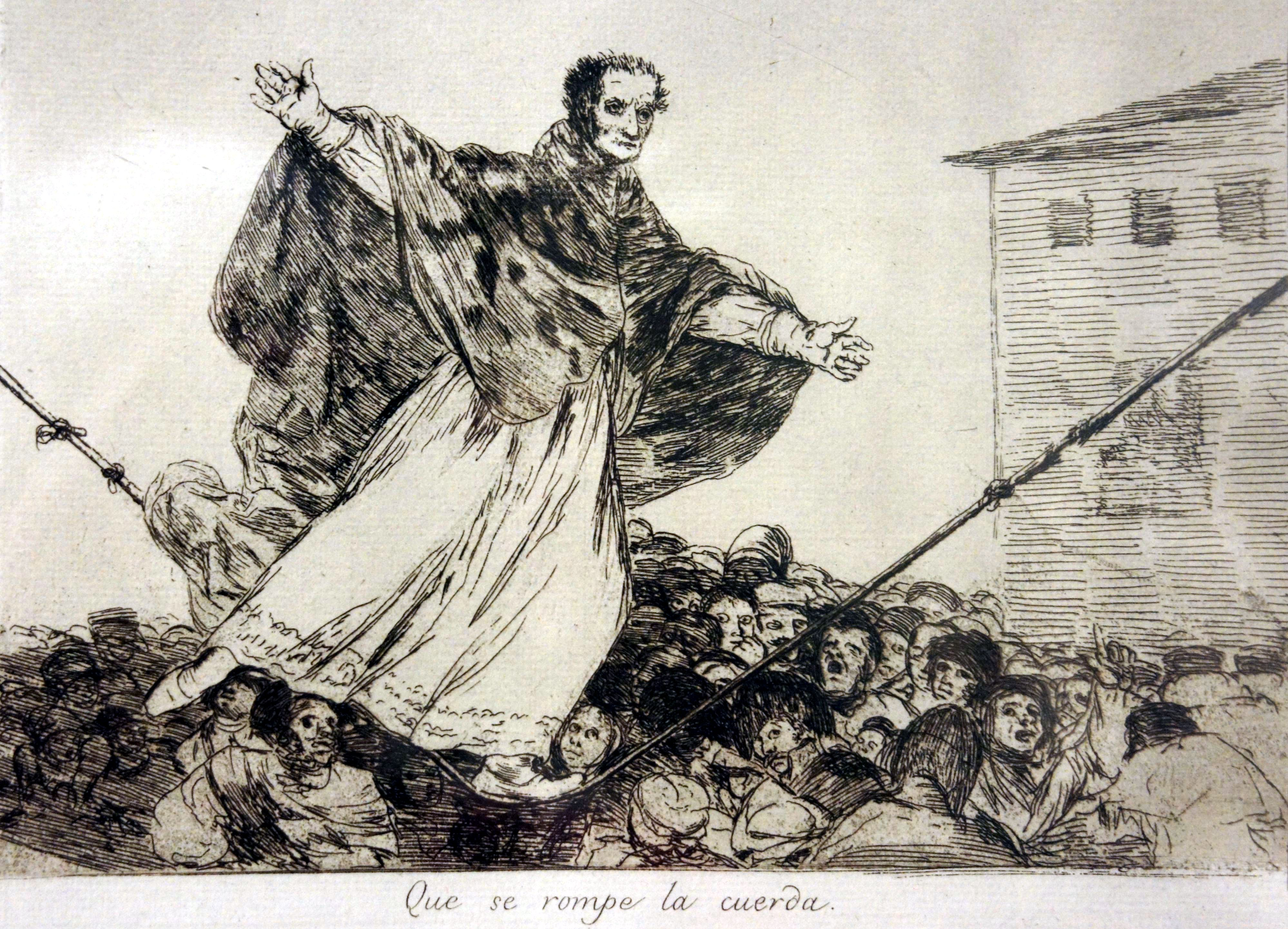 77. Que se rompe la cuerda. 178 x 221 mm. Aguafuerte, aguada o aguatinta bruñida y punt seca. Un personaje eclesiástico, con rica túnica y amplia capa pluvial, avanza haciendo equilibrios por una cuerda demasiado floja sobre un espeso grupo de curiosos; la casa firme y segura, hacia la cual el equilibrista se dirige, ya no queda a su alcance y el peso del acróbata amenaza romper la ya desgastada maroma: Que se rompe la cuerda es el título de la estampa, a modo de comentario de la multitud que sigue con la vista las evoluciones del purpurado. Quien, por cierto, en el dibujo preliminar del Museo del Prado, porta una tiara que Goya ha preferido omitir en la lámina, lo que ilustra sobre la primera intención del dibujante y su prudencia o escrúpulo ante una caricatura papal, que la prudencia de Pío VIl no merecía.